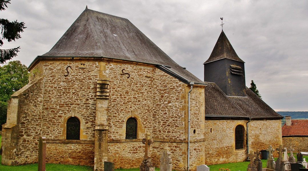 église St Remi